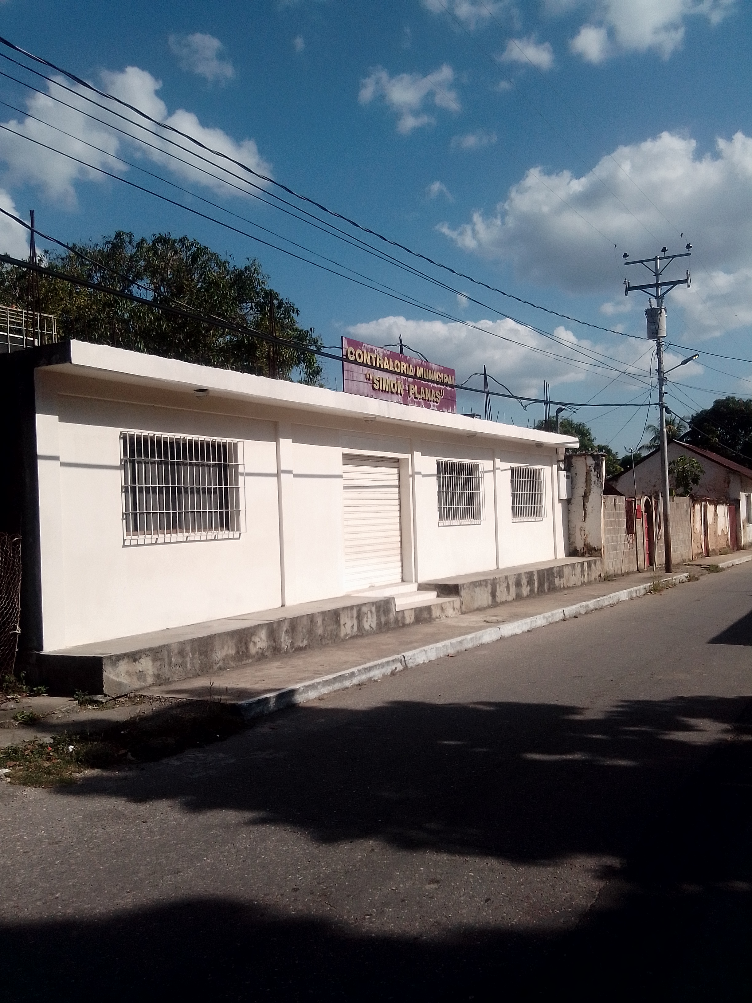 Contraloria del Municipio Simón Planas